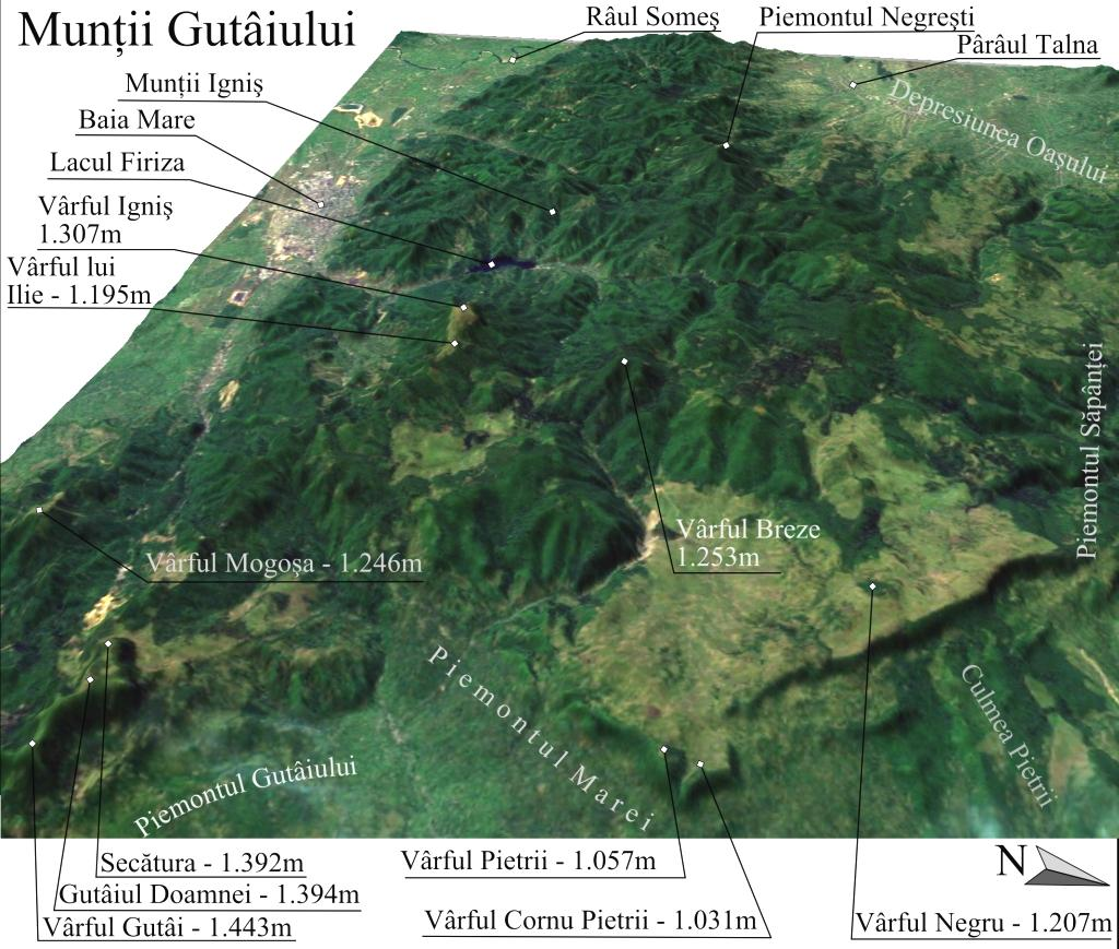 Munţii Gutâiului - Hartă 3D. Imagine realizată cu date SRTM şi textură Wolrd Imagery.